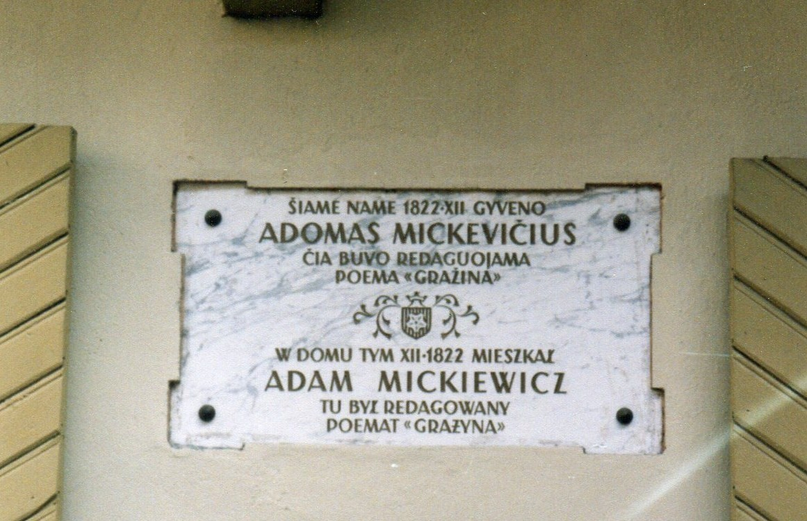 Tablica mickiewiczowska w Wilnie.